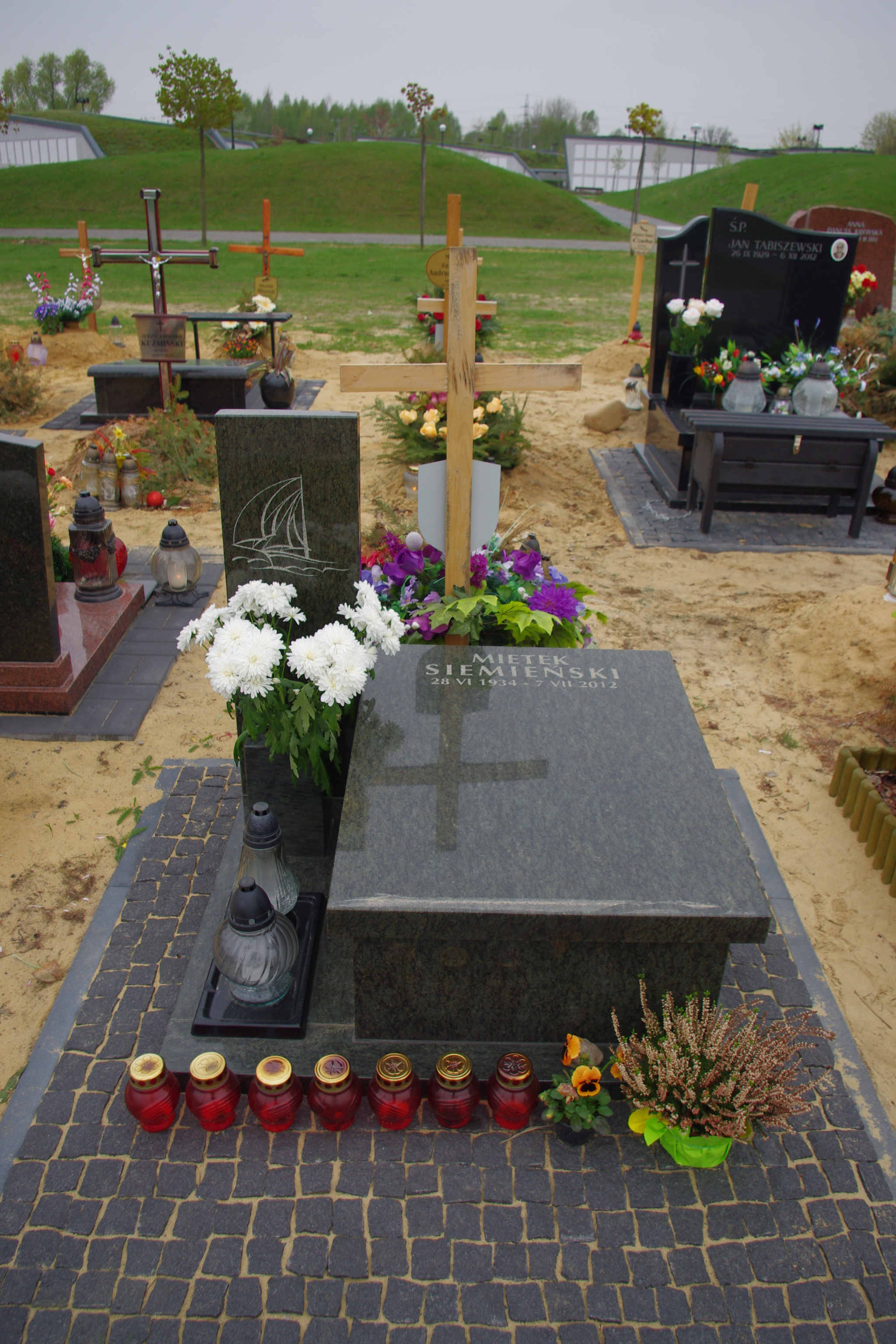 Grób scenarzysty i reżysera filmów dokumentalnych Mieczysława Siemieńskiego (1934-2012) na Cmentarzu Komunalnym Północnym w Warszawie